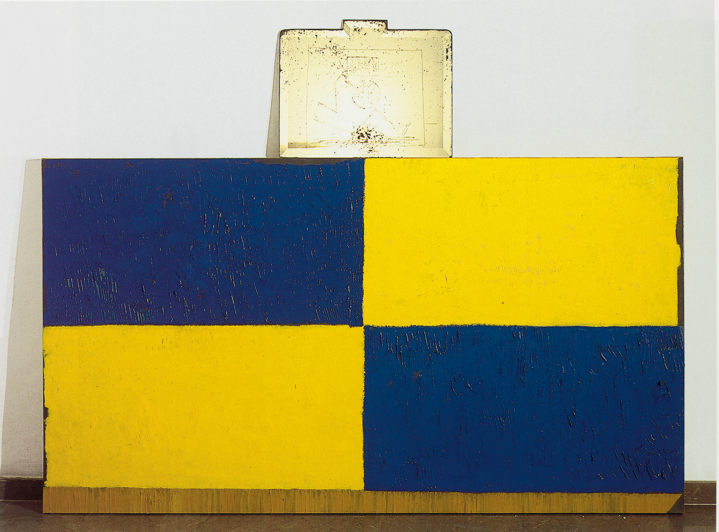 Superpuesto no24 basado en un tema de Paracas